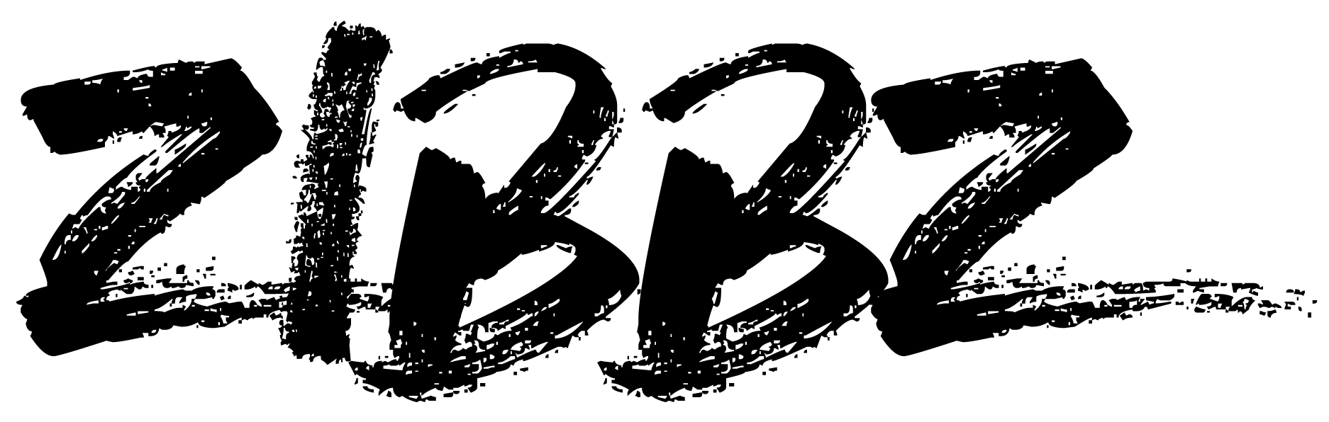 Logo der Band ZiBBZ